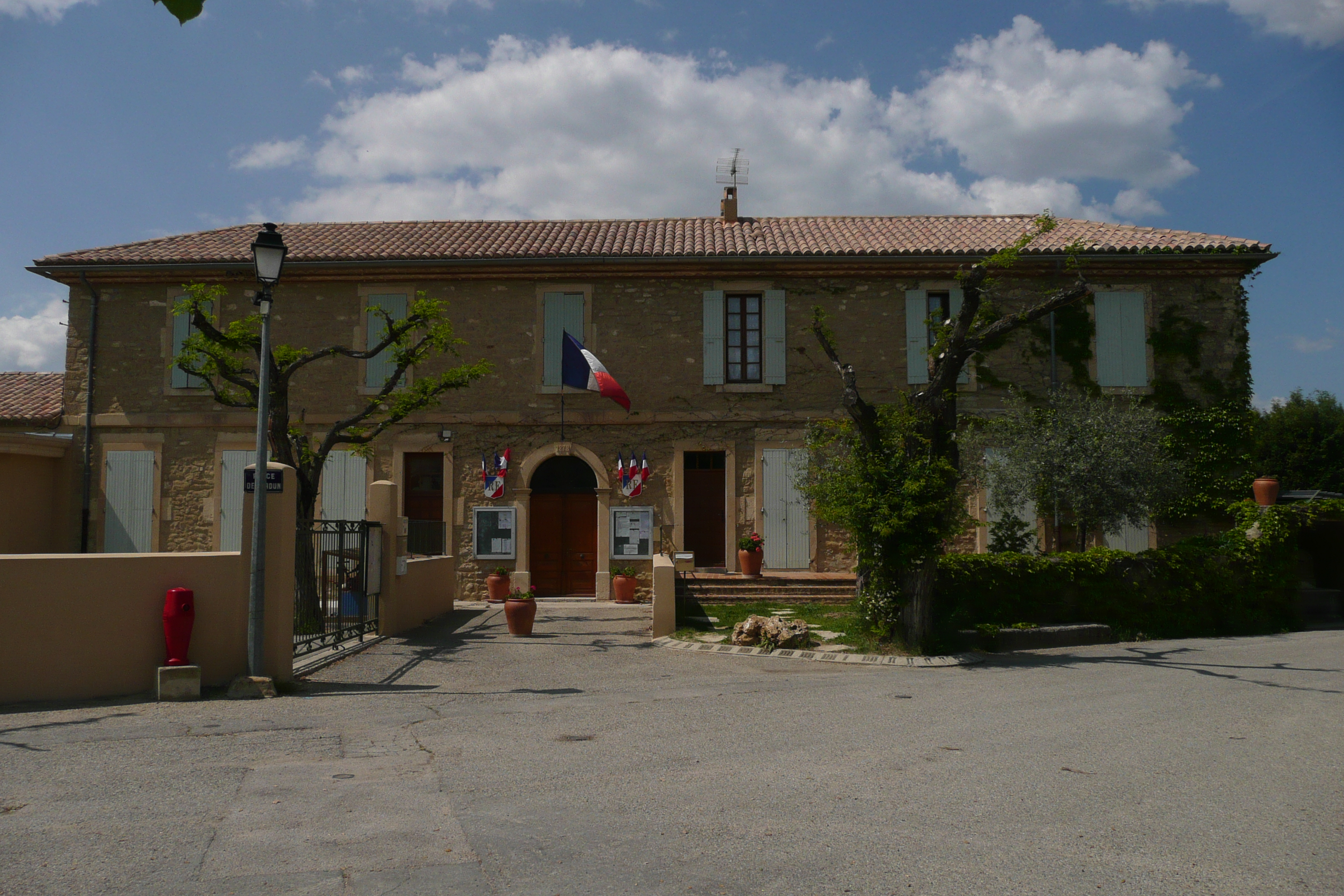 Mairie à Mérindol-les-Oliviers (Drôme, France).